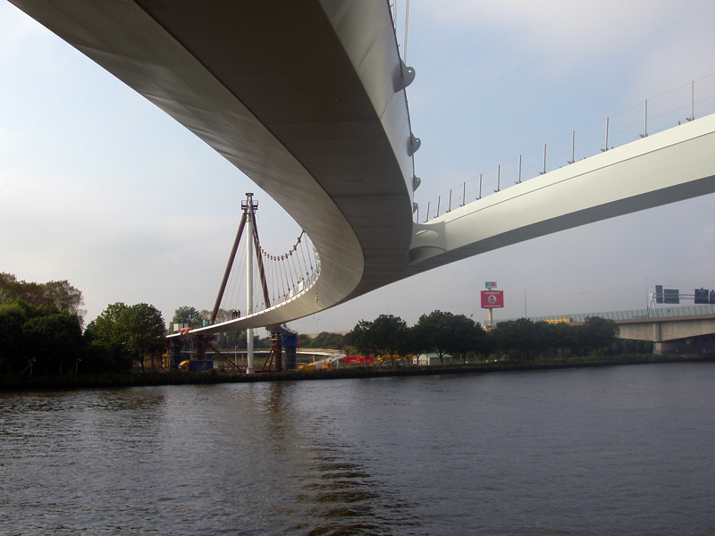 Eigen foto, genomen op 5 oktober 2005